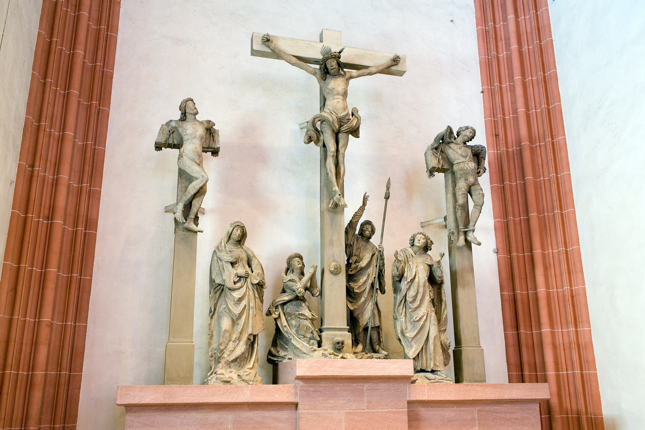 Original der 1509 von Hans Backoffen geschaffenen Kreuzigungsgruppe im Kaiserdom St. Bartholomäus in Frankfurt am Main. Selber fotografiert im Februar 2008, Doppellizensierung GFDL & CC-BY-SA 2.5.